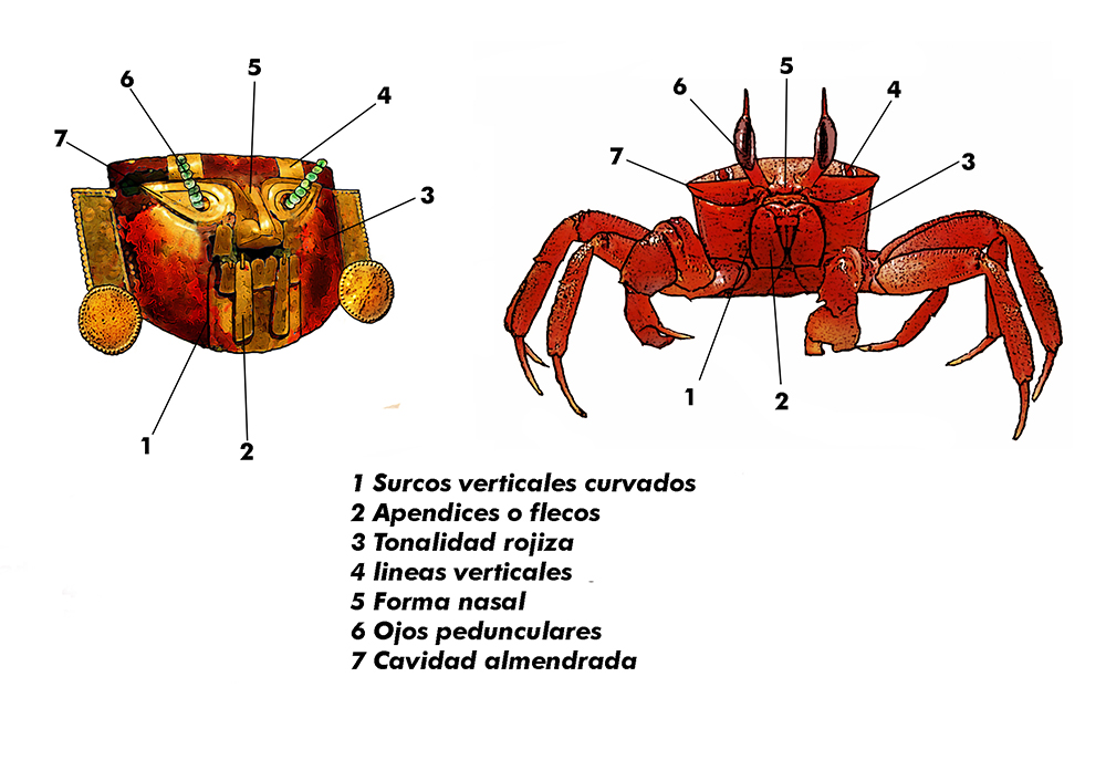 Grafico comparativo del crustaceo y la máscara lambayeque